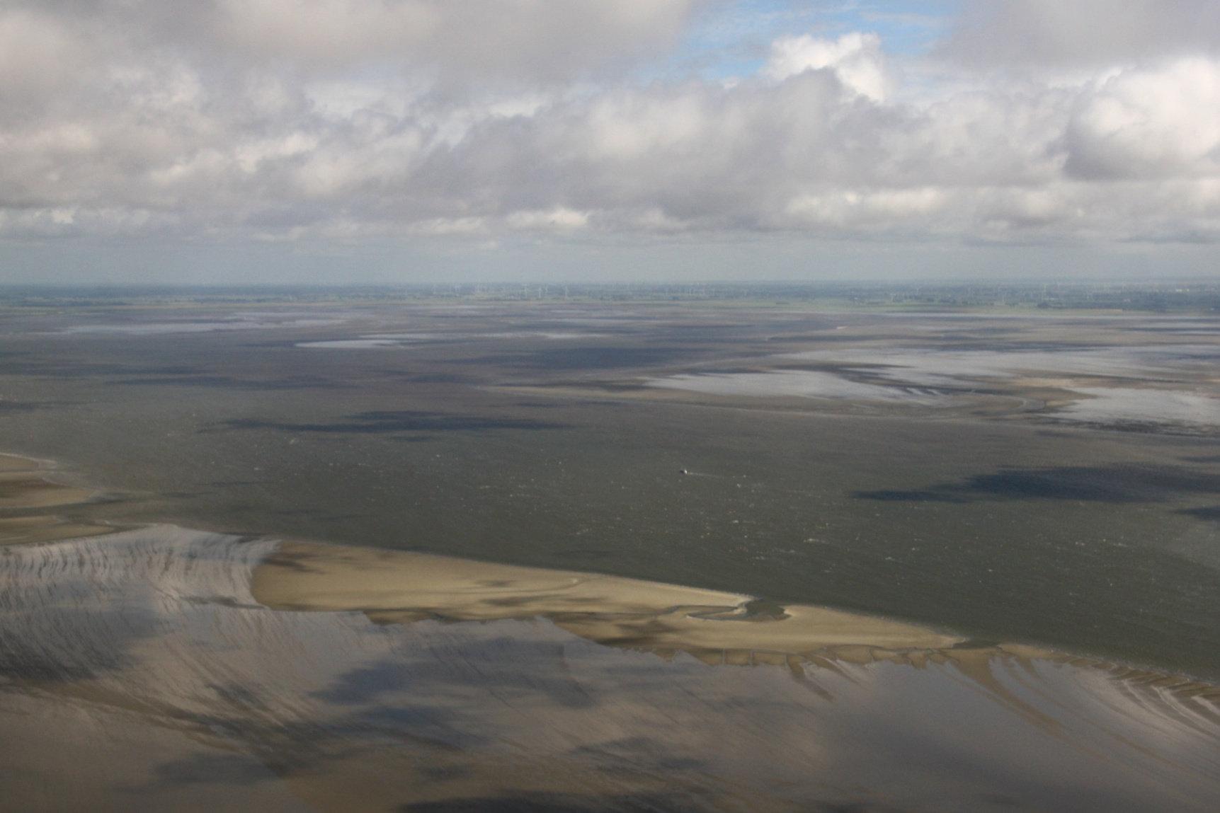 Wattenmeer vor Büsum